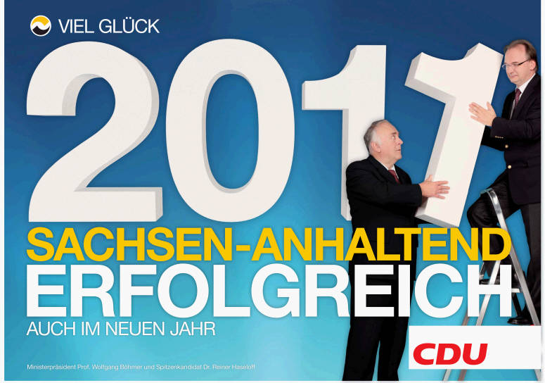 Viel Glück 2011 Sachsen-Anhaltend Erfolgreich Auch im neuen Jahr Ministerpräsident Prof. Wolfgang Böhmer und Spitzenkandidat Dr. Reiner Haseloff CDUAbbildung:Böhmer übergibt für 2011 die Nr. 1 an Haseloff Kommentar:Wahlplakat 1. Welle InternetdownloadPlakatart:Kandidaten-/Personenplakat mit PorträtAuftraggeber:CDU LV Sachsen-AnhaltObjekt-Signatur:10-036 : 1406Bestand:Landtagswahlplakate Sachsen-Anhalt (10-036)GliederungBestand10-18:Landtagswahlplakate Sachsen-Anhalt (10-036) » CDULizenz:KAS/ACDP 10-036 : 1406 CC-BY-SA 3.0 DE